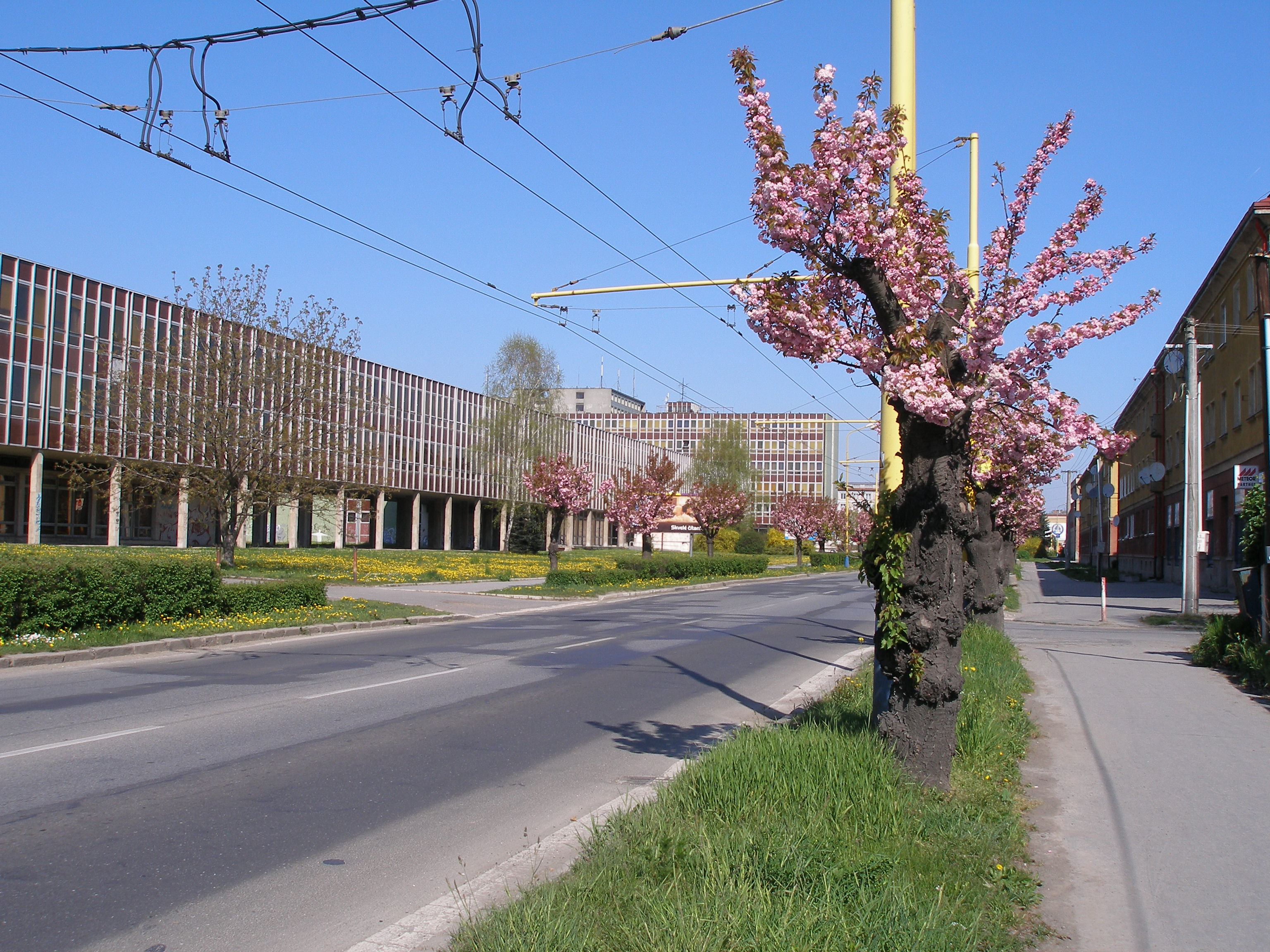 Budova Prešovskej univerzity